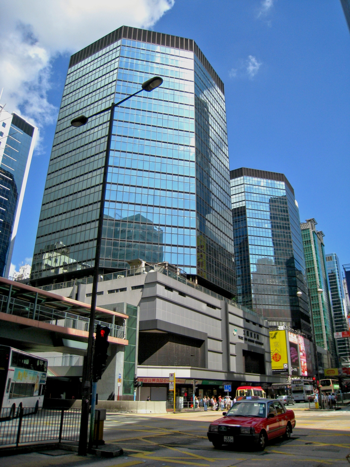 HK Argyle Centre 香港 旺角中心